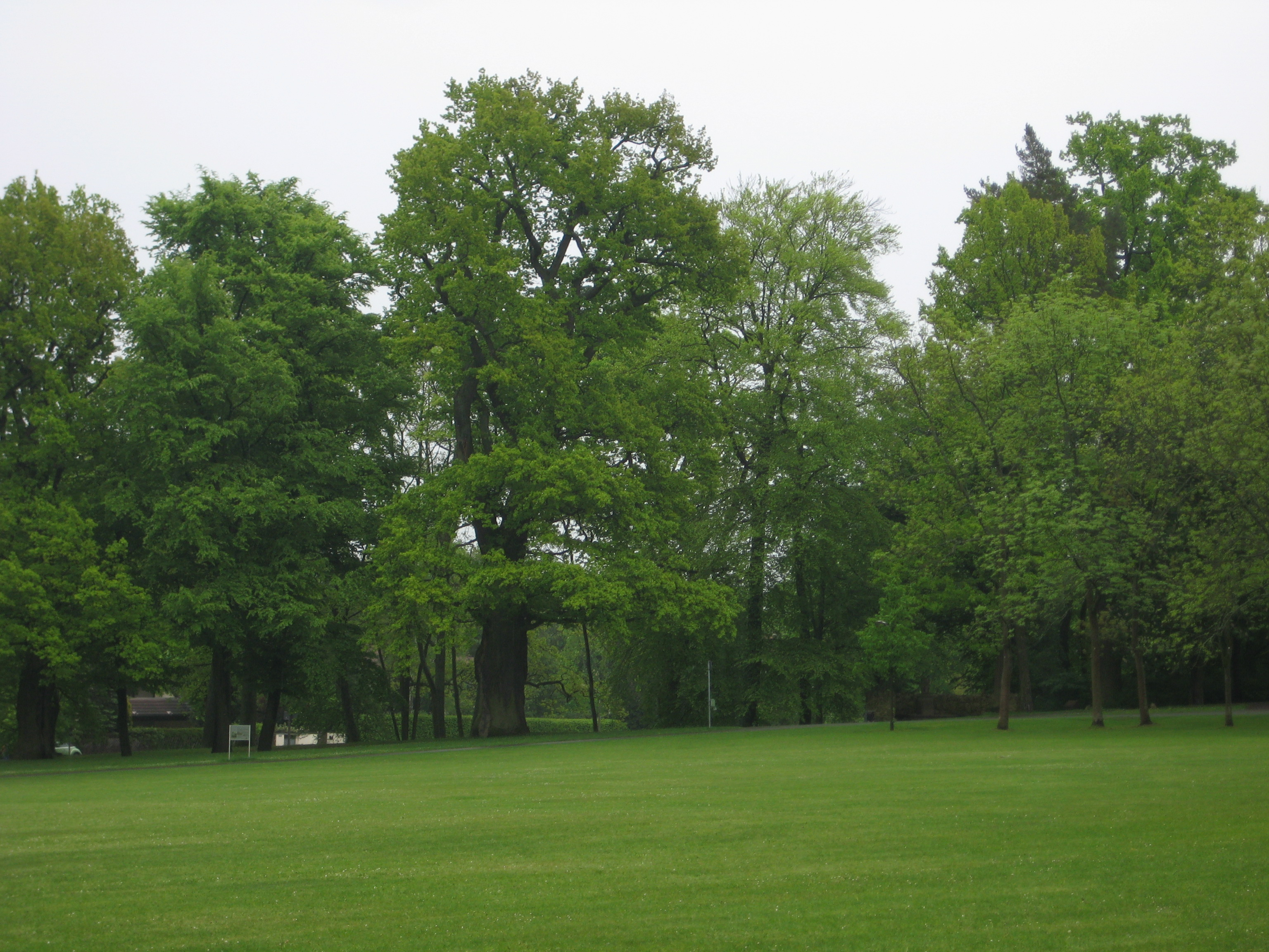 Quercus robur im Park am Platnersberg (Nürnberg), von N. Am rechten Rand die Anlage des Bärenbrunnens.